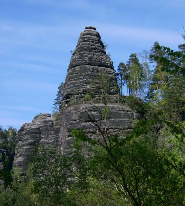 Pískovcový útvar nedaleko Pravčické brány v Děčínské vrchovině